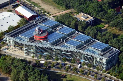 POTSDAM 04.09.2012 Blick auf die Hochschule für Film und Fernsehen " Konrad Wolf " in Potsdam im Bundesland Brandenburg. Die staatliche Bildungsstätte an der Marlene-Dietrich-Allee im Stadtteil Babelsberg wurde 1954 gegründet. // View of College for Film and Television " Konrad Wolf " in Potsdam in Brandenburg.